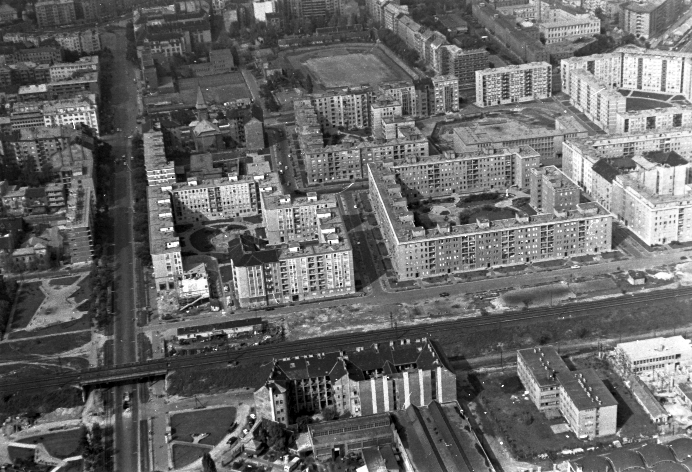 légifotó Lágymányosról. Az előtérben a Hamzsabégi út látszik, baloldalon a Fehérvári út vezet fel a Móricz Zsigmond körtérre. Location: Hungary, Budapest XI. Tags: aerial photo, Budapest Title: légifotó Lágymányosról. Az előtérben a Hamzsabégi út látszik, baloldalon a Fehérvári út vezet fel a Móricz Zsigmond körtérre.